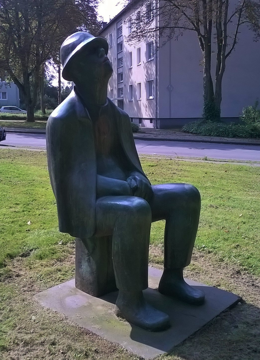 Die lebensgroße Skulptur „Taubenvater, der auf seine Tauben wartet“ von Hubert Nietsch (1950). Standort: Gelsenkirchen, Hövelmannstraße Ecke Nattmanssweg, nördliche Straßenseite.